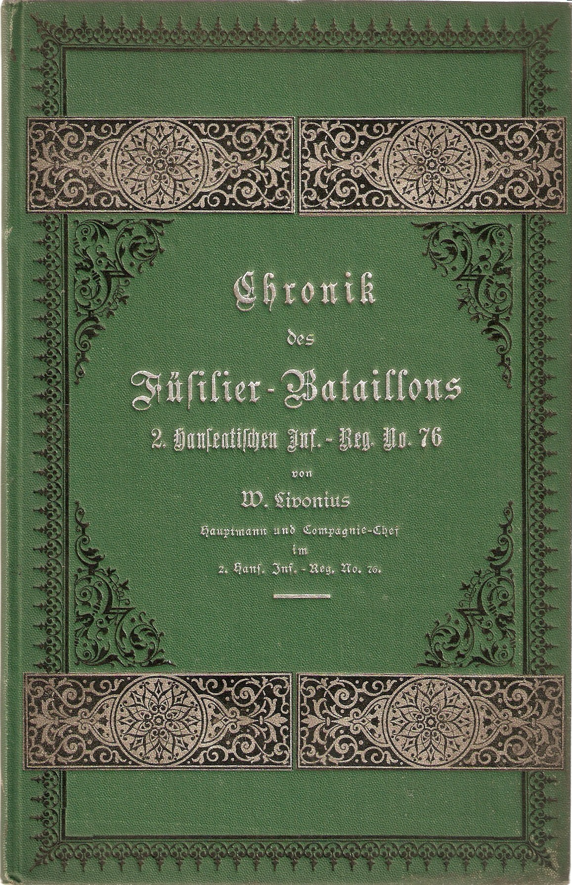 Chronik des Füsilier-Bataillons 2. Hanseatisches Inf.-Regt. No. 76